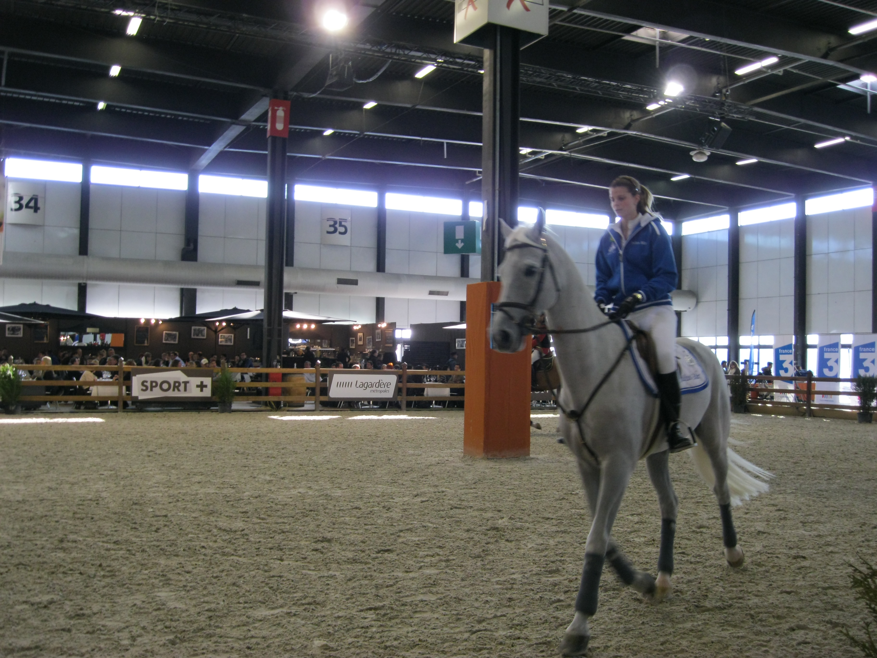 Athina Onassis de Miranda sur AD Crosshill au jumping international de Bordeaux en 2012